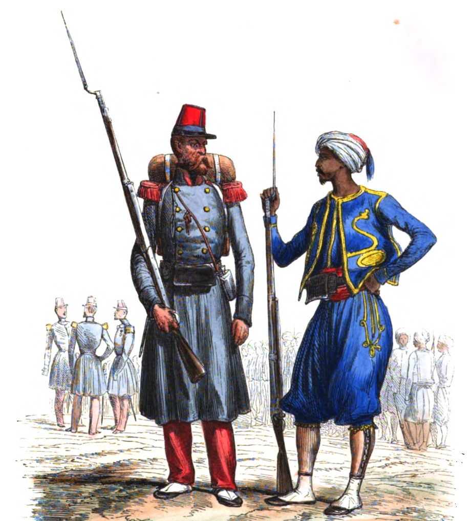 Régiments envoyés en Afrique de 1830 à 1843 - Légion étrangère et tirailleurs indigènes